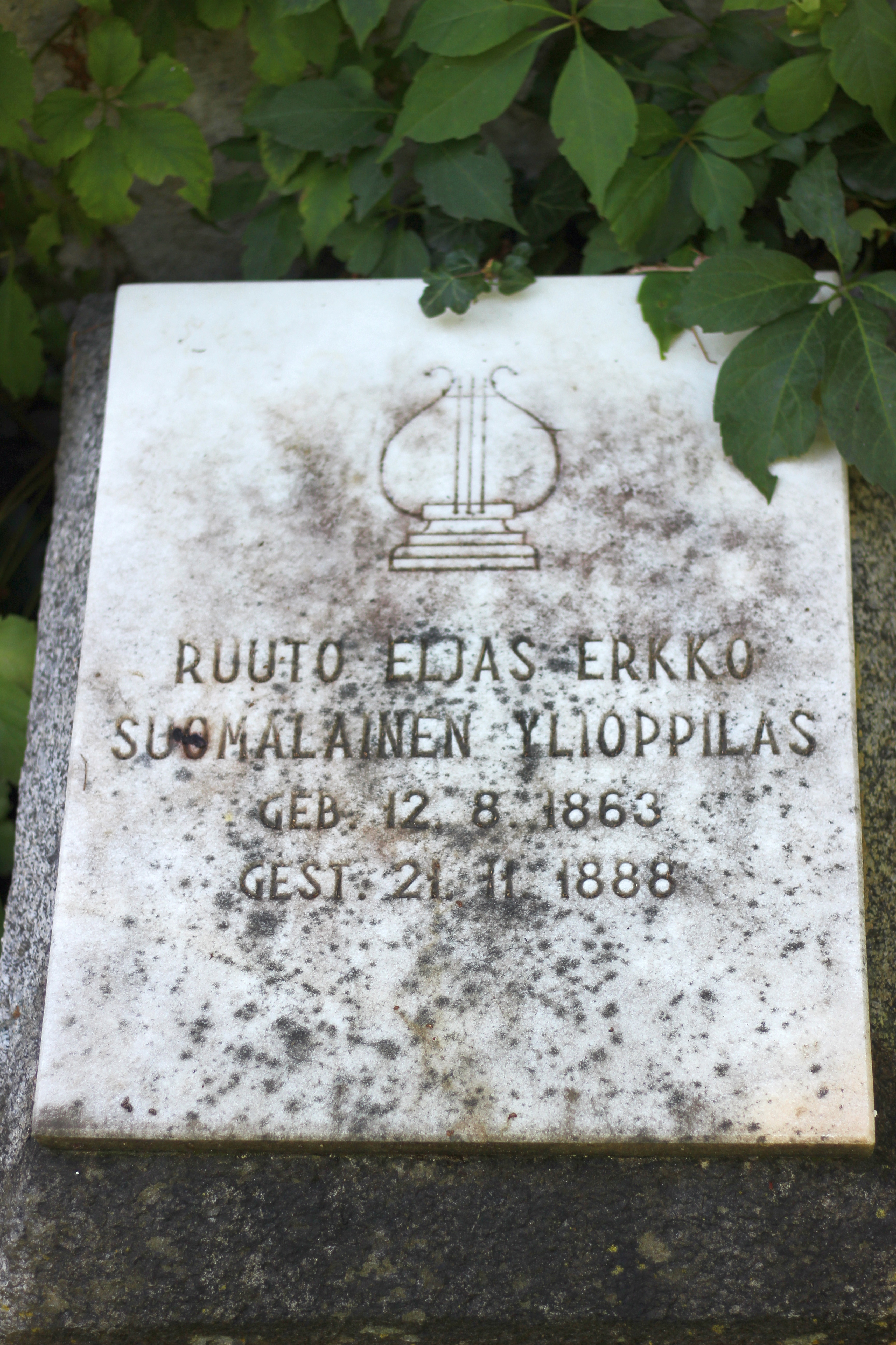 Grabstein von Elias Erkko auf dem Friedhof der Evangelische Gemeinde Merans